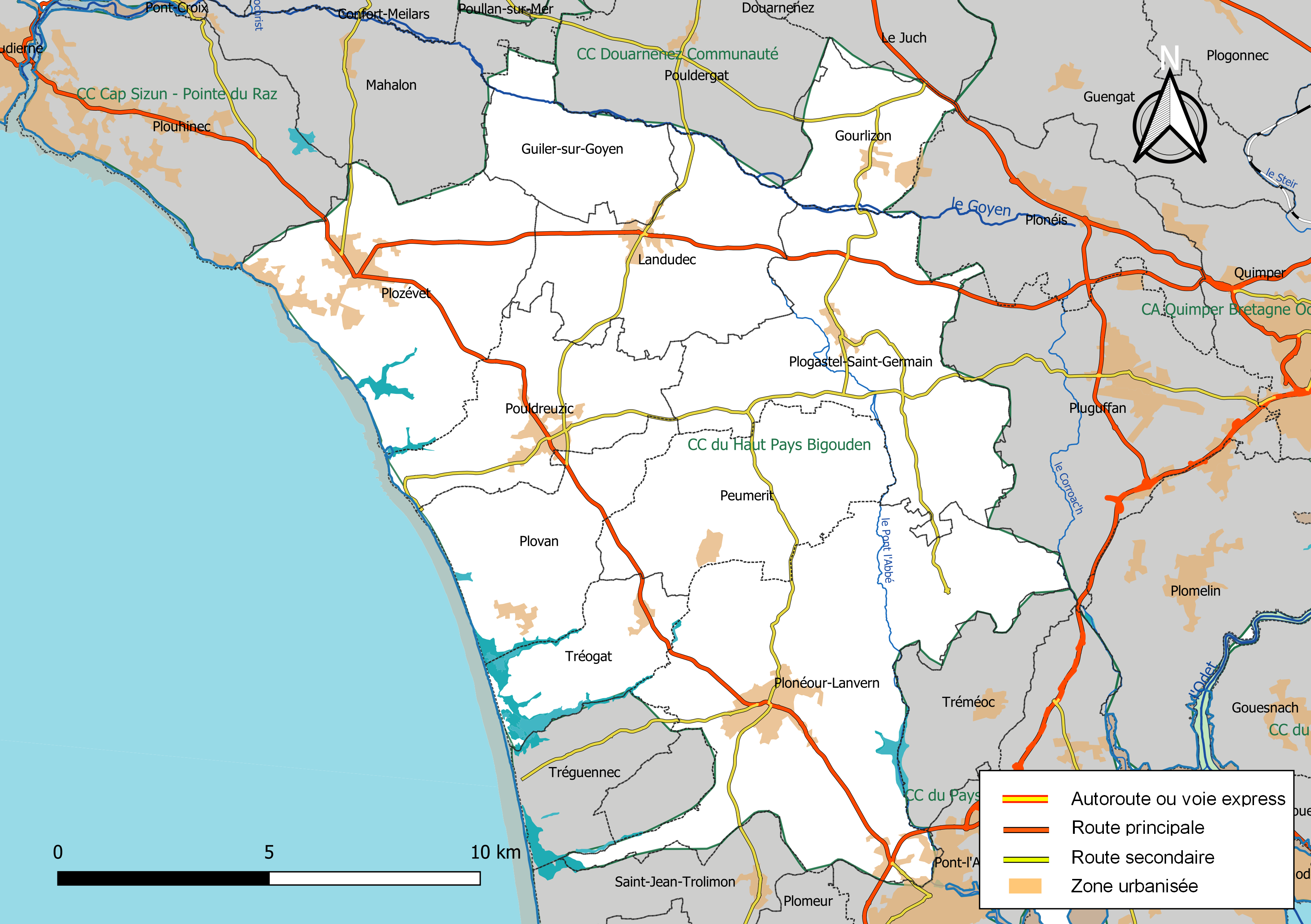 Carte géographique de la Communauté de communes du Haut Pays Bigouden, département du Finistère, France. Composition au 1er janvier 2019.